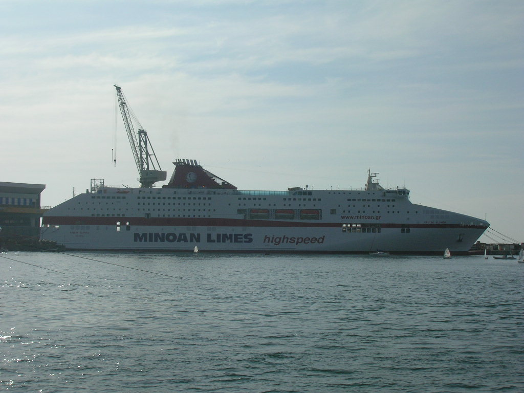 Cruise Olympia, traghetto della Minoan Lines, nel porto di Castellammare di Stabia